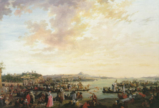 "Vue de Marseille : Joute et fête sur l'eau" by French painter Charles Eschard. Vente aux enchères à Lille, Maîtres Mercier et Cie, 24 octobre 1999, no 242 comme de Charles Eschard, adjugé 1 380 000 Francs.